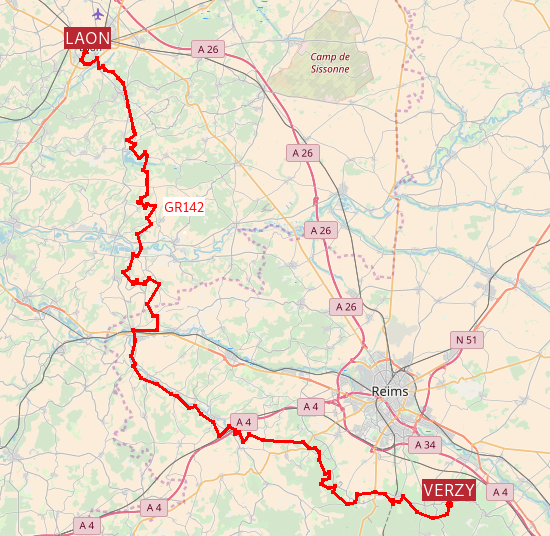 Tracé du GR 142, réalisé avec GPS et édition avec le logiciel libre VIKING